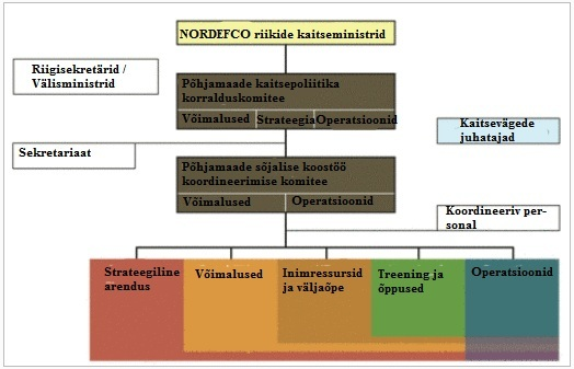 NORDEFCO (Põhjamaade kaitsekoostöö) struktuurijoonis